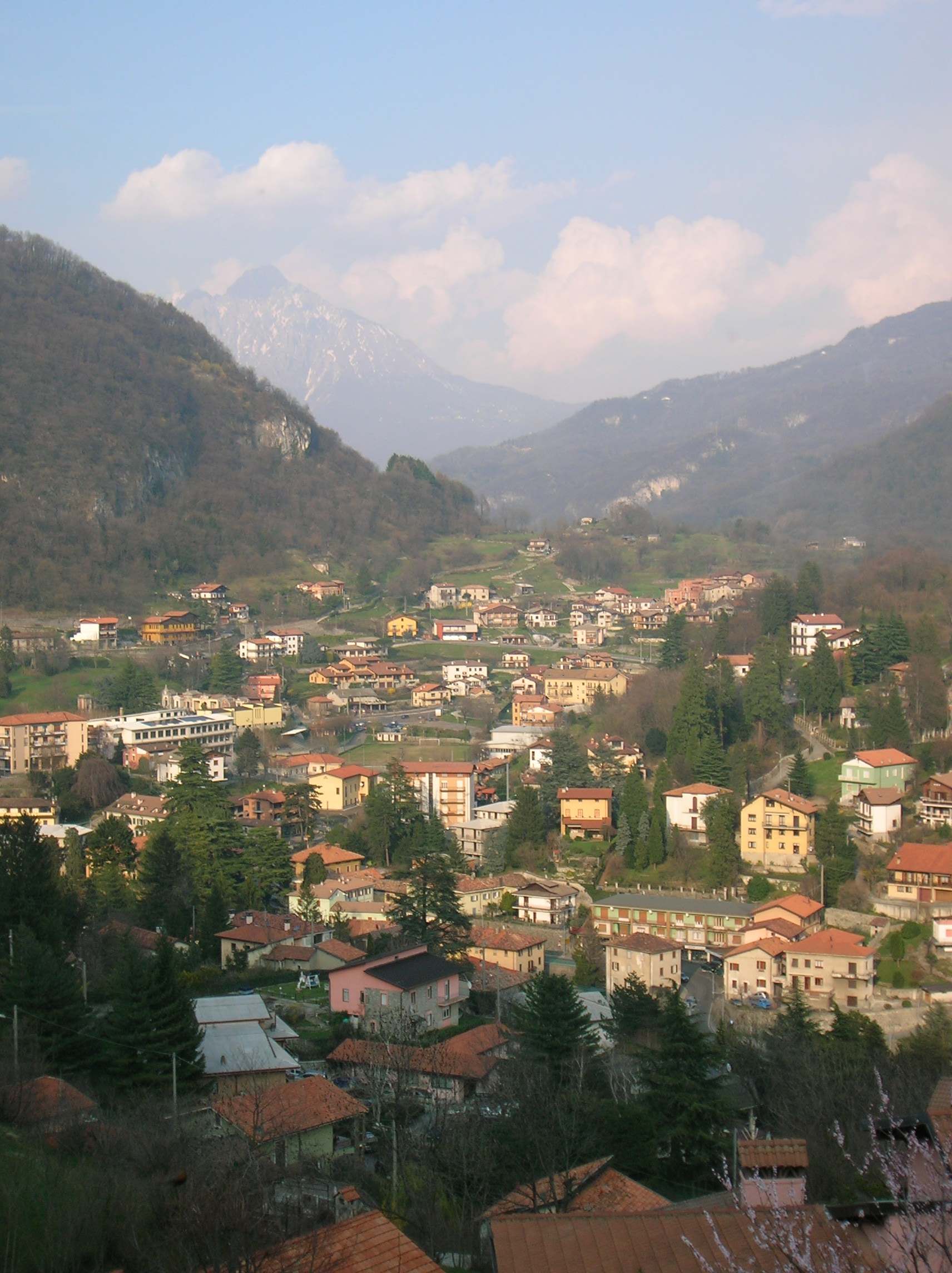 panorama primaverile di Asso. Sullo sfondo, la Grignetta